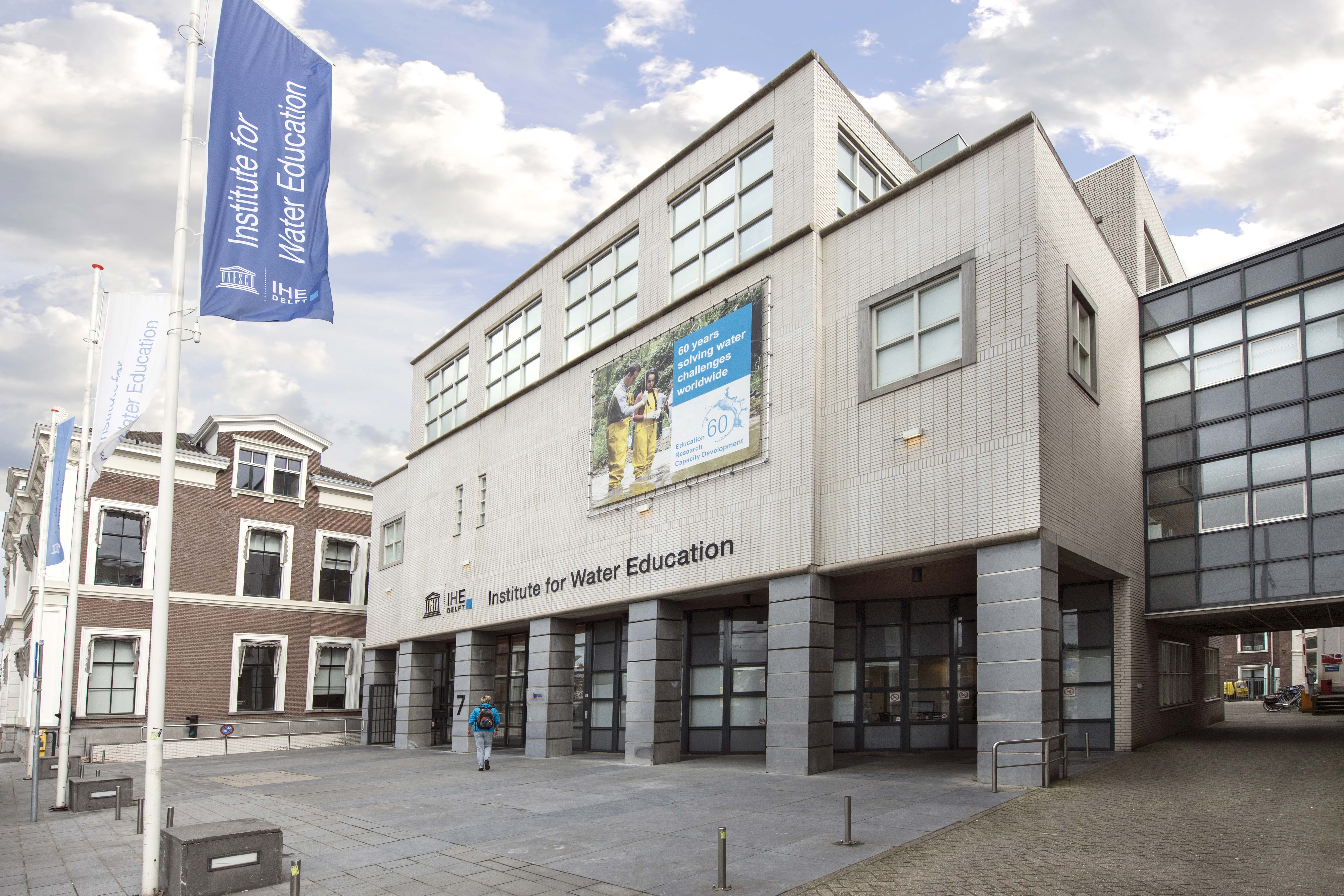 Facade IHE Delft Institute for Water Education in Delft